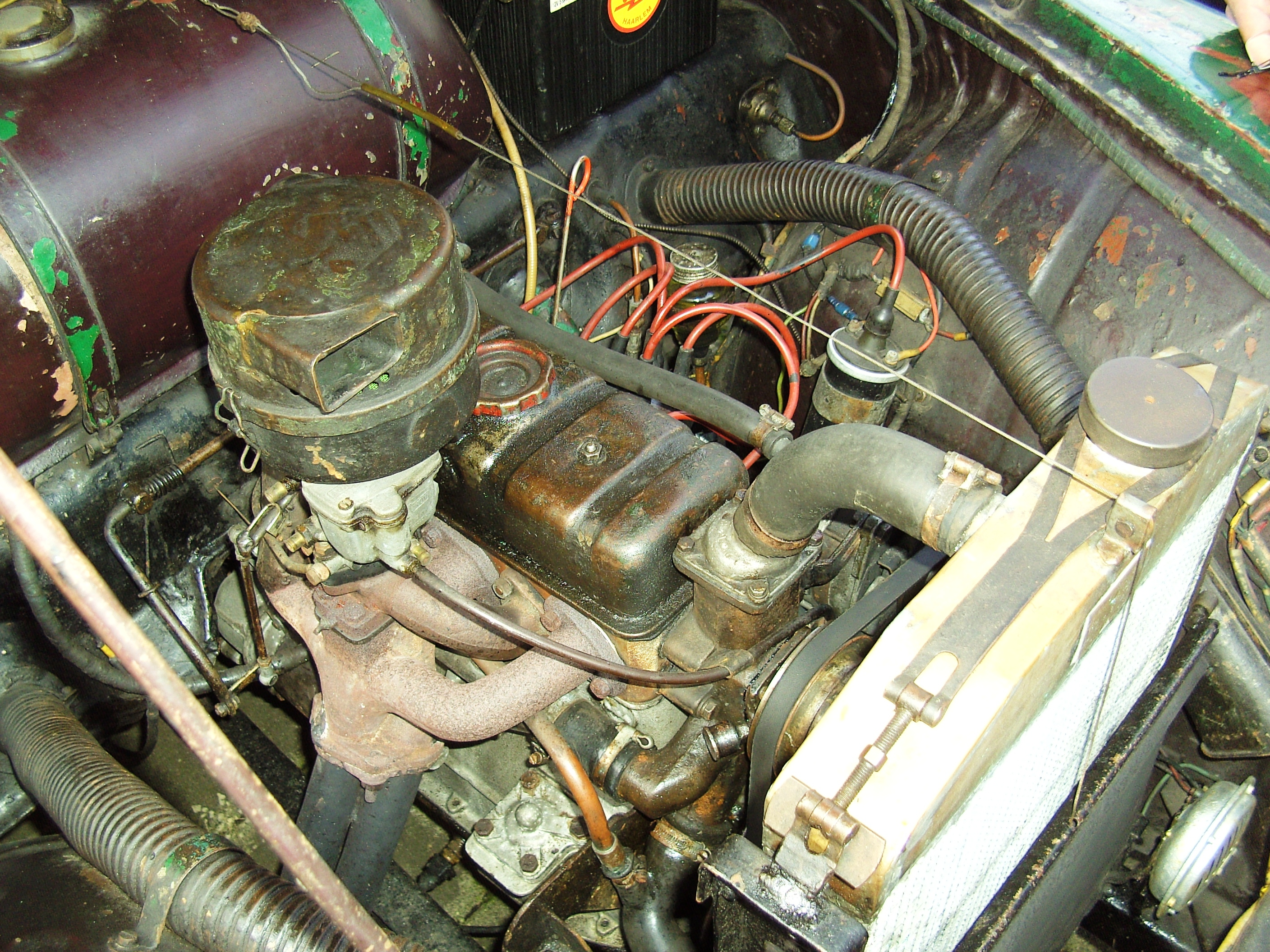 Škoda 1200 - motor